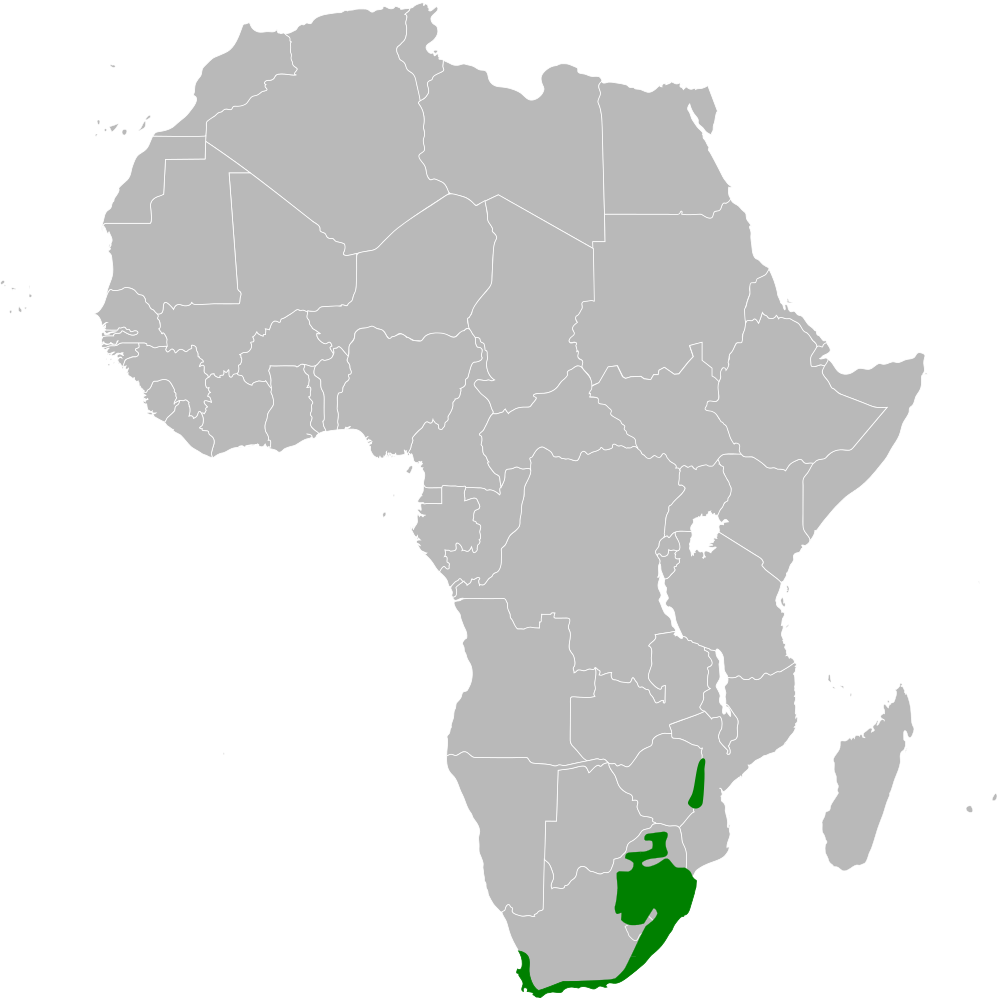 Sphenoeacus afer distribution map, based on